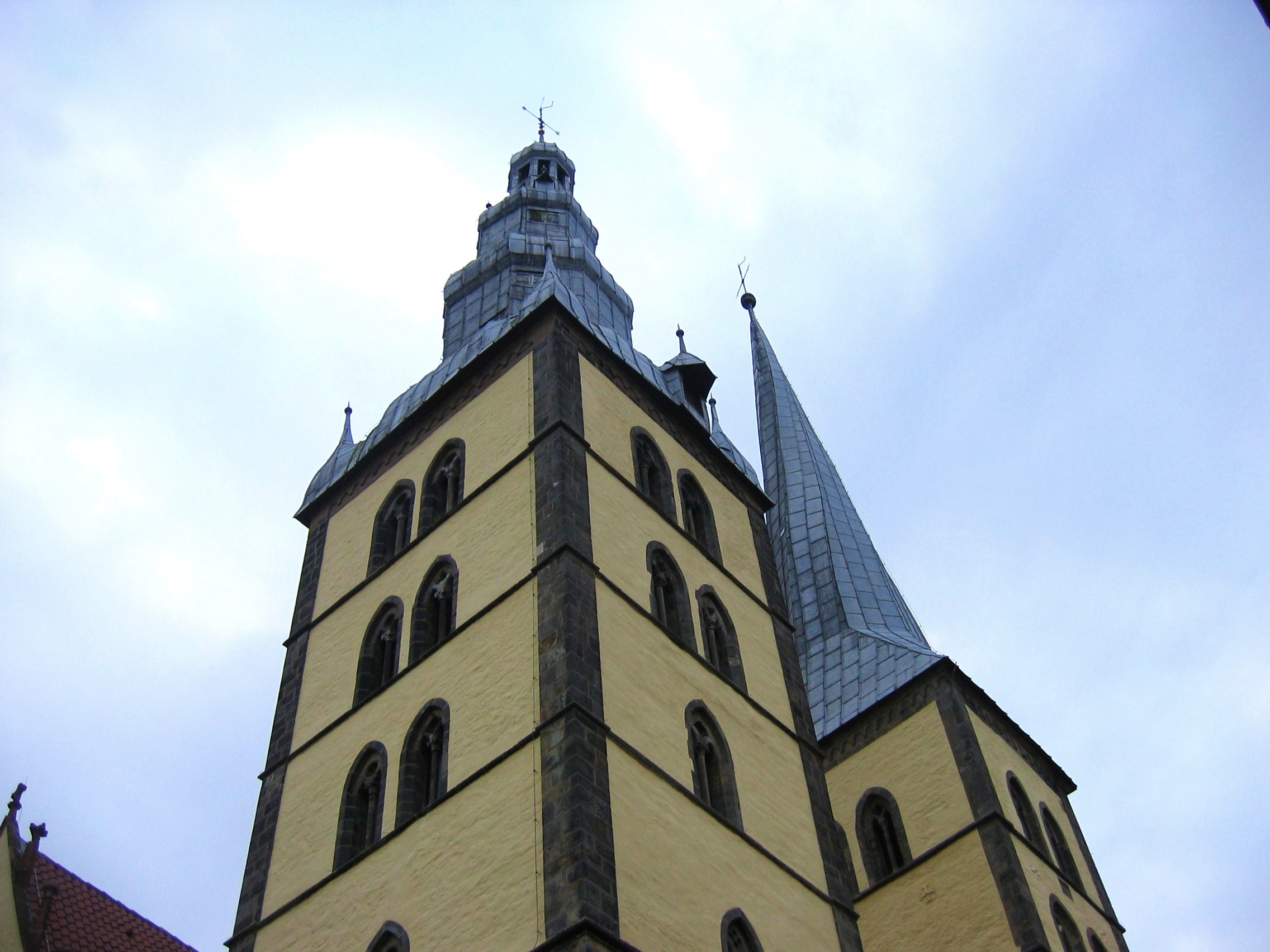 Ev.-luth. Stadtpfarrkirche St. Nicolai in Lemgo